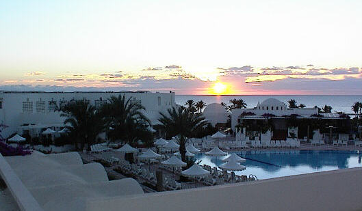 Hôtel près de la mer et lever de soleil.